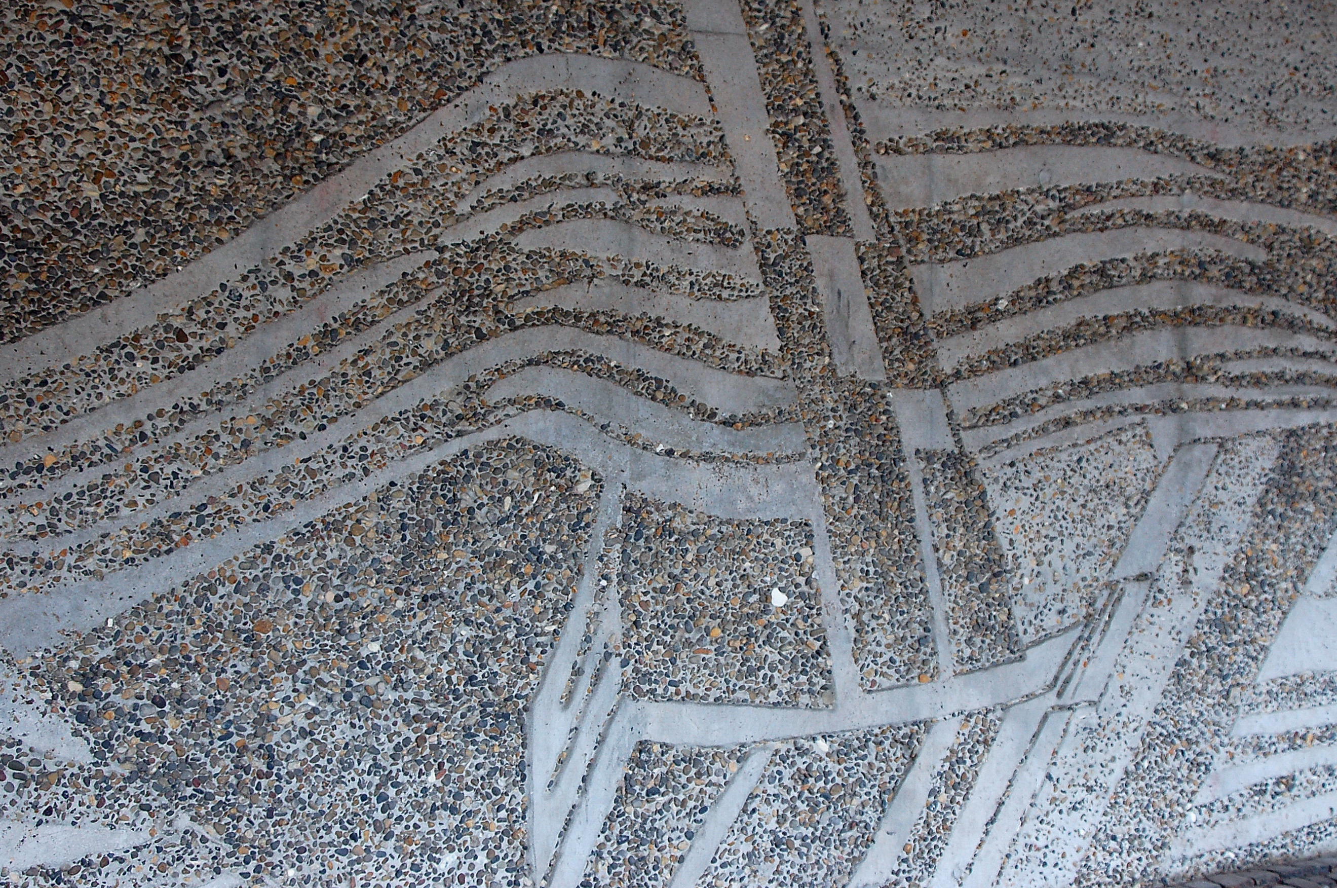 Livsströmmen av Per Thorlin 1973 blästrad betong på Bibliotekshusets fasad.